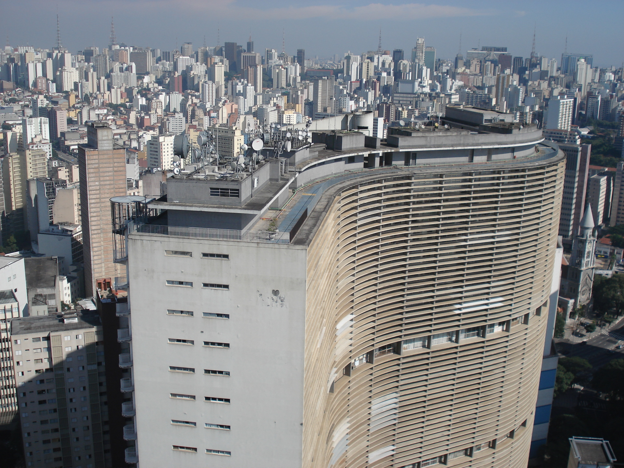 Edifício COPAN em São Paulo